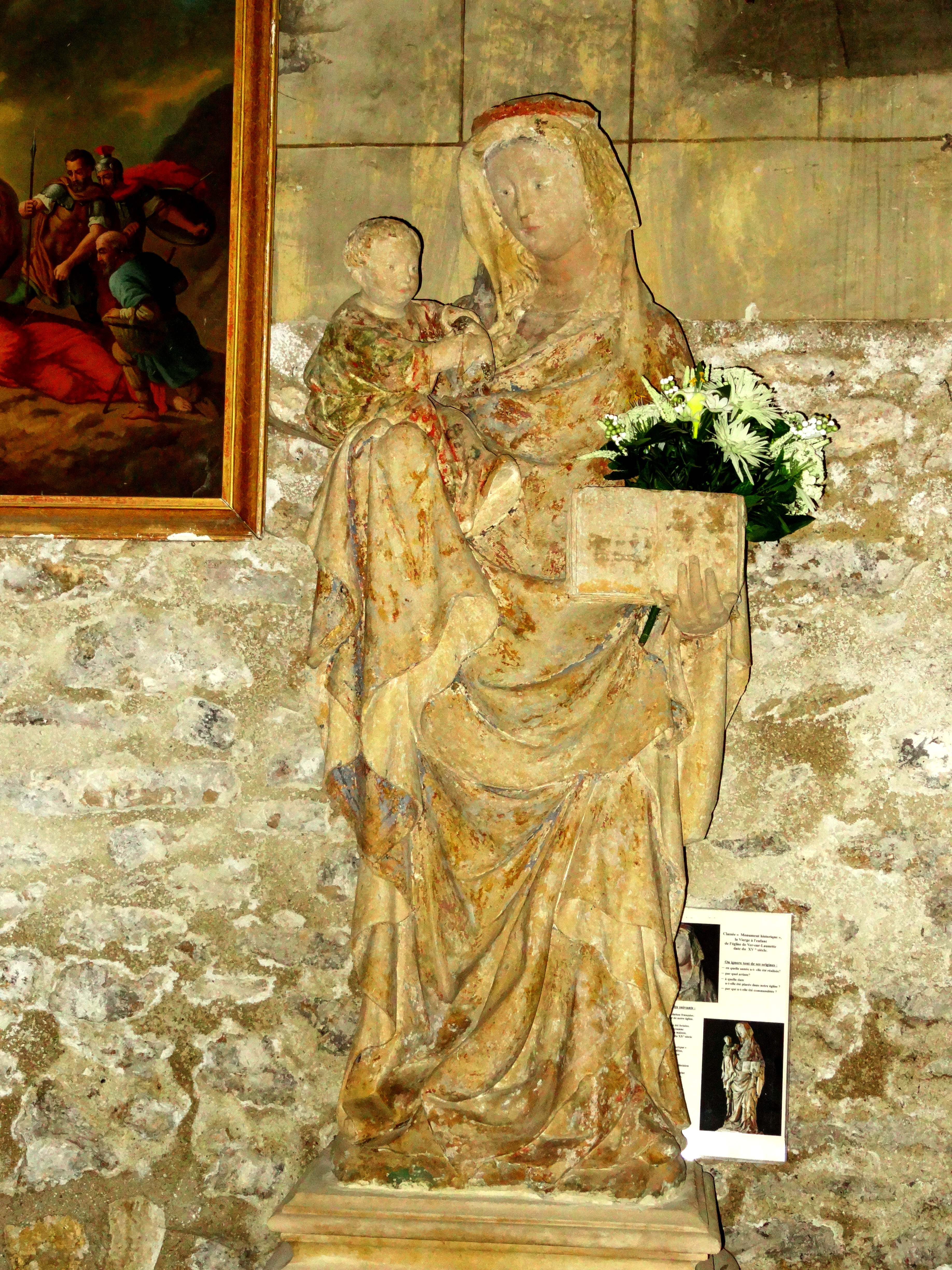 Vierge à l'Enfant.